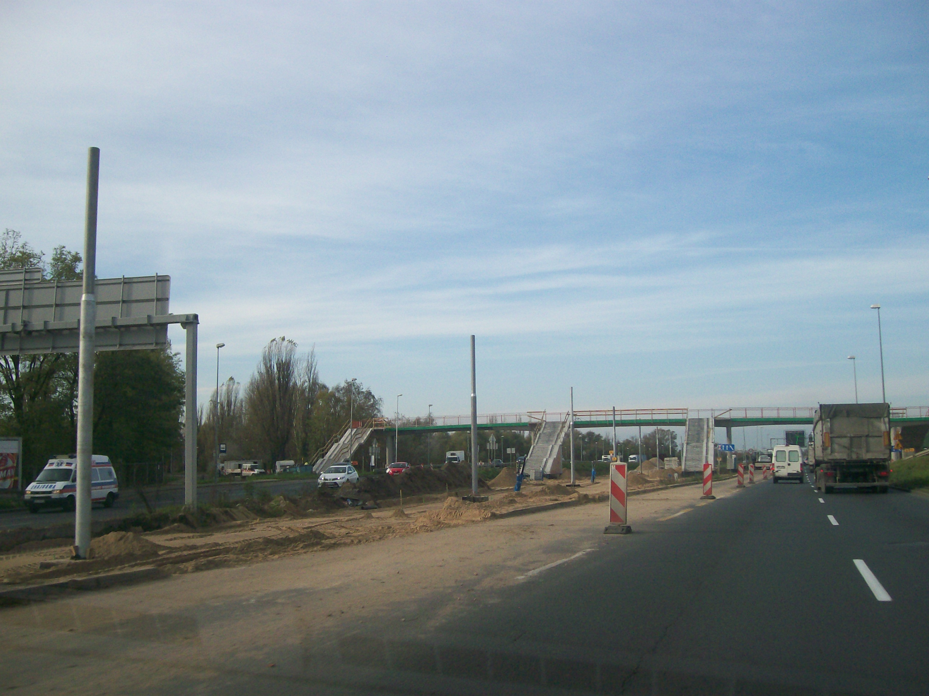 Budowa Szczecińskiego Szybkiego Tramwaju